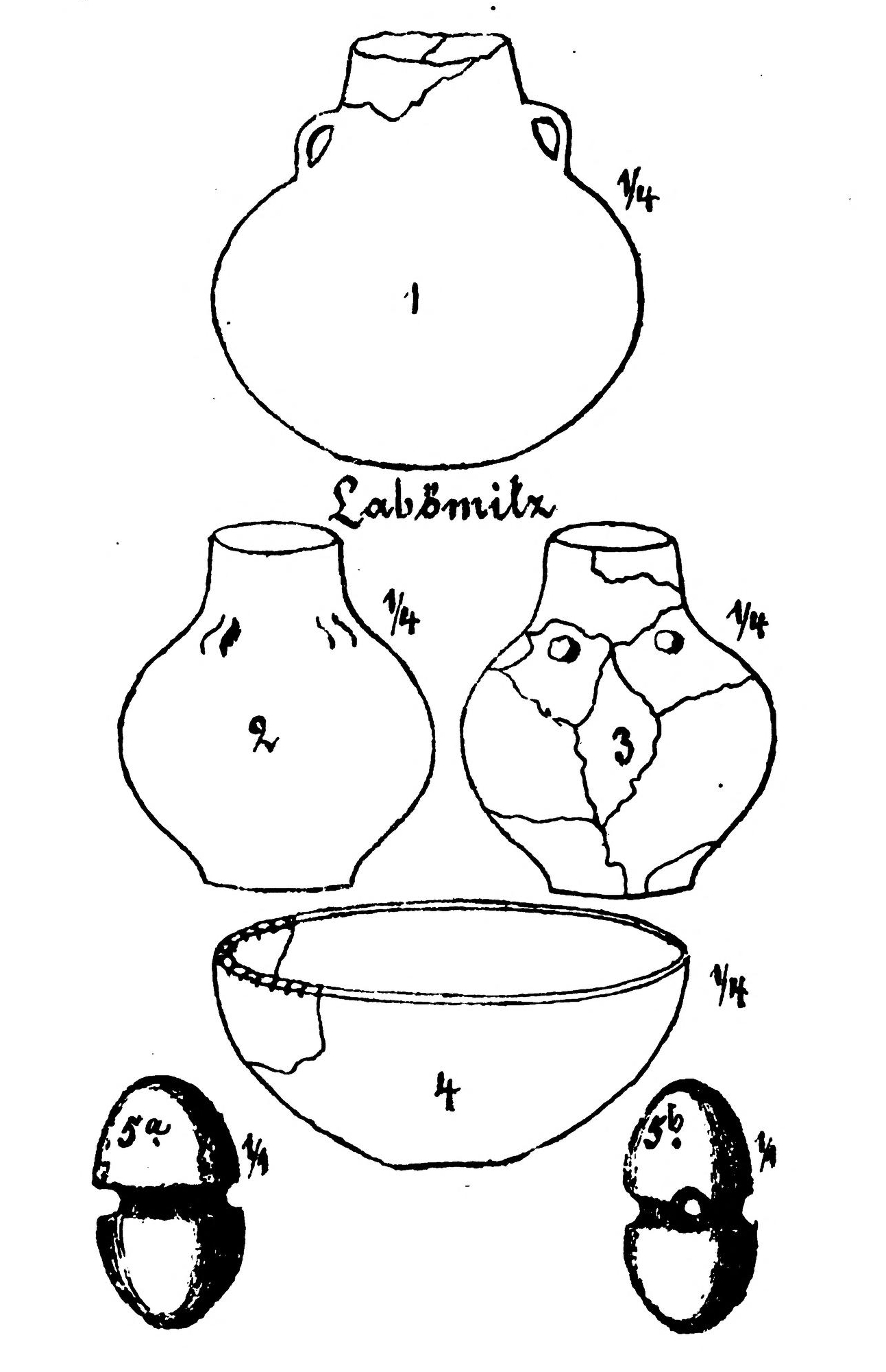 Grabbeigaben aus zwei Steingräbern bei Labömitz, Usedom; Trichterbecher- und Kugelamphorenkultur